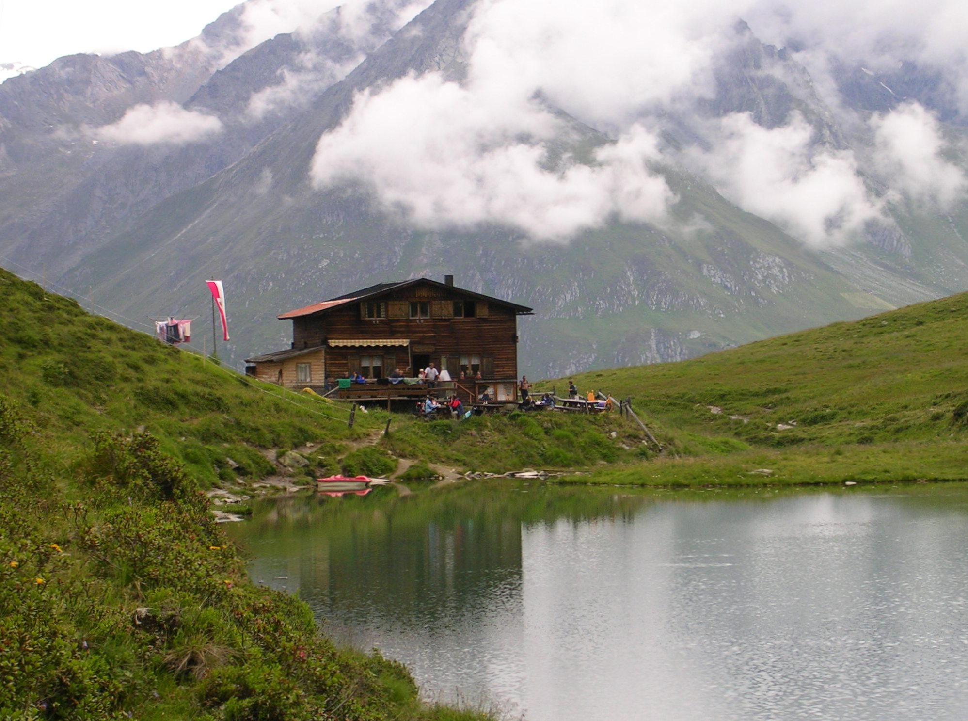 Bergerseehütte in der Gemeinde Virgen